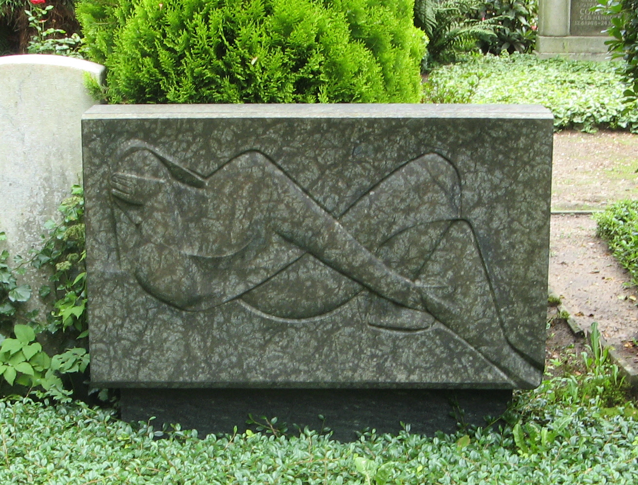 Grabmal von Prof. Kurt Lehmann auf dem Herrenhäuser Friedhof, Nr. 17 in Friedhofsbroschüre